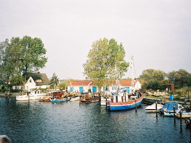 Harbor of Neuendorf, Hiddensee, Germany